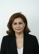 Souad Sbai, politica italiana